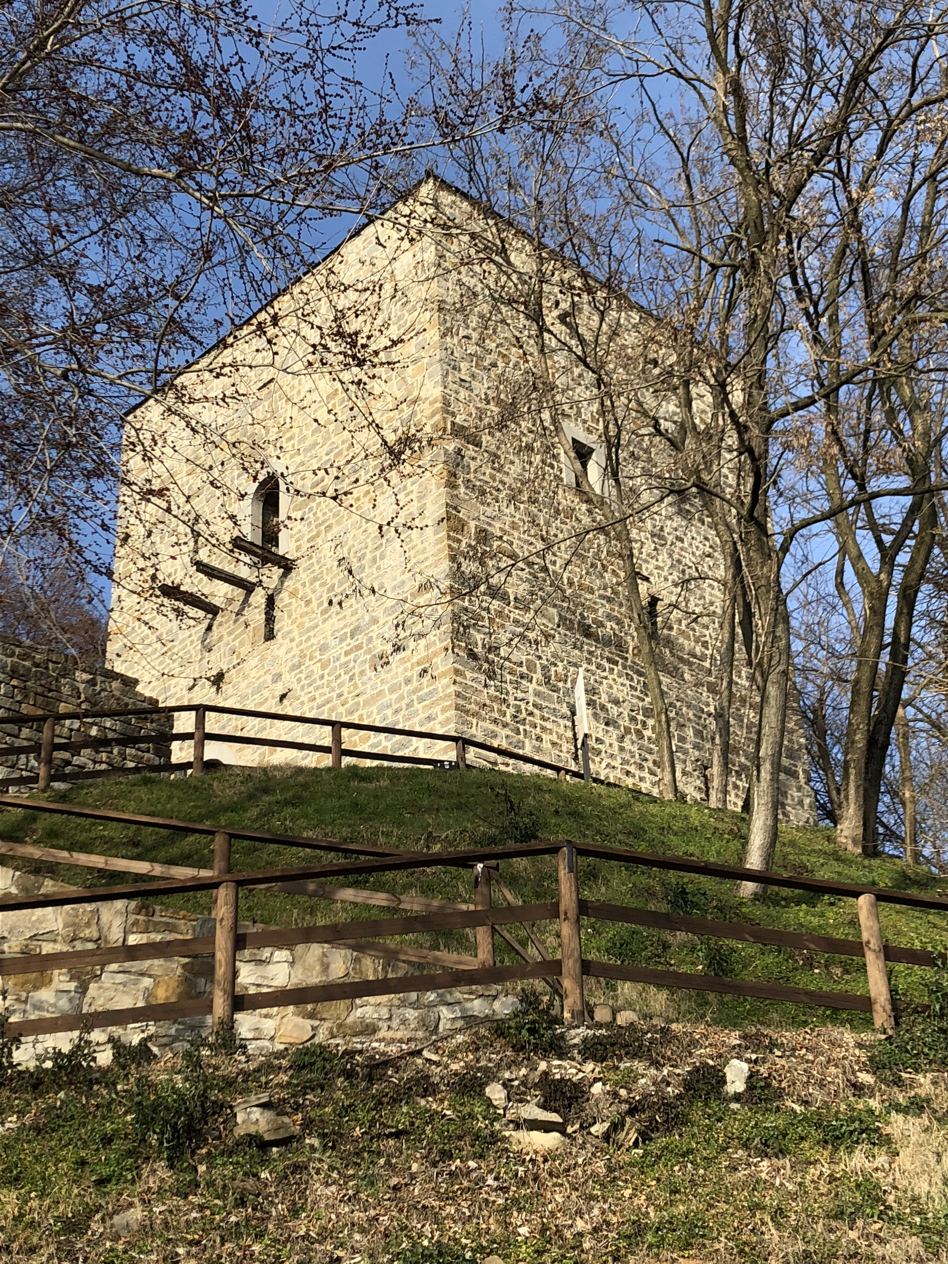 Castello Partistagno